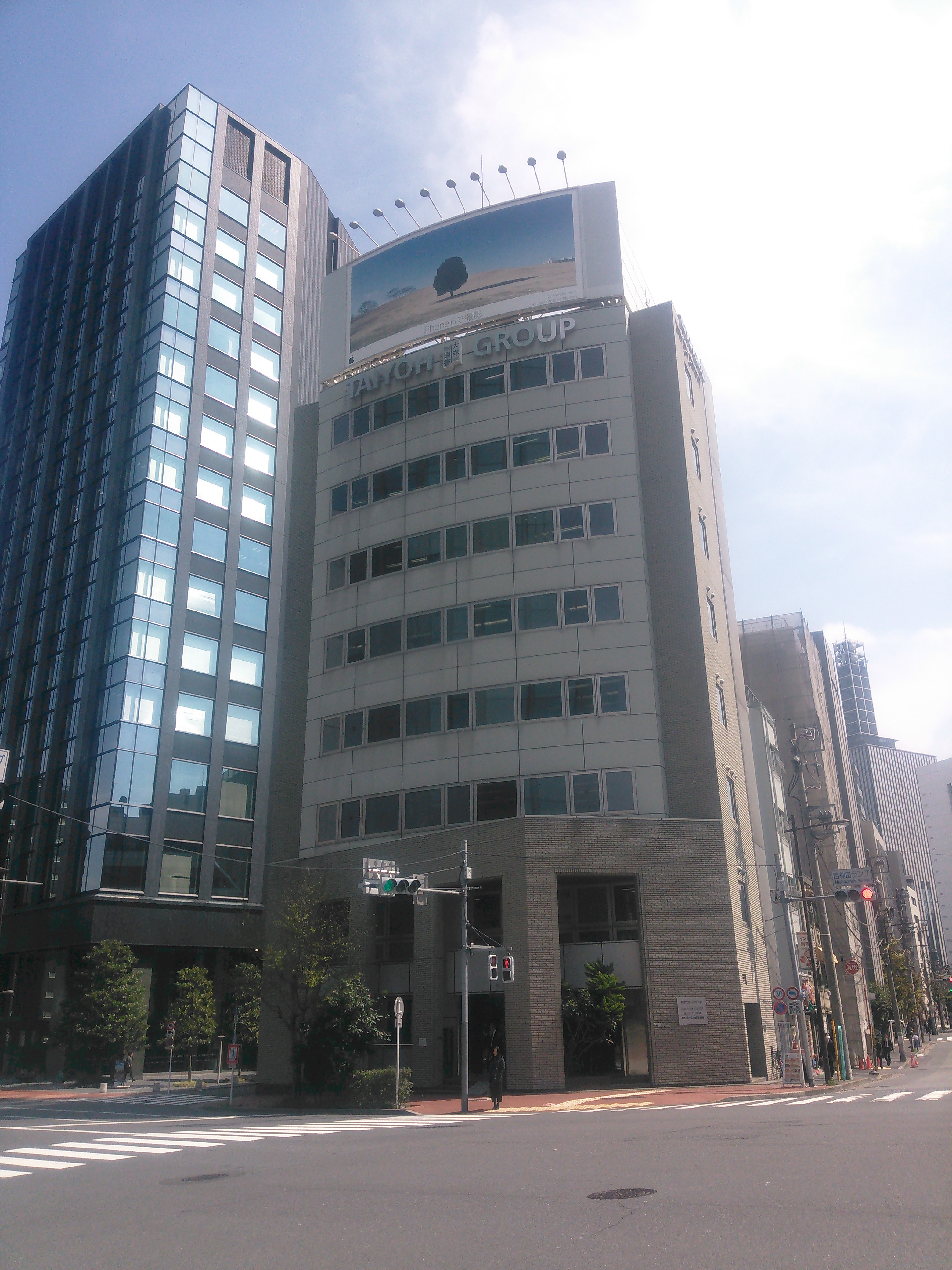 東京都千代田区西神田、大洋図書本社